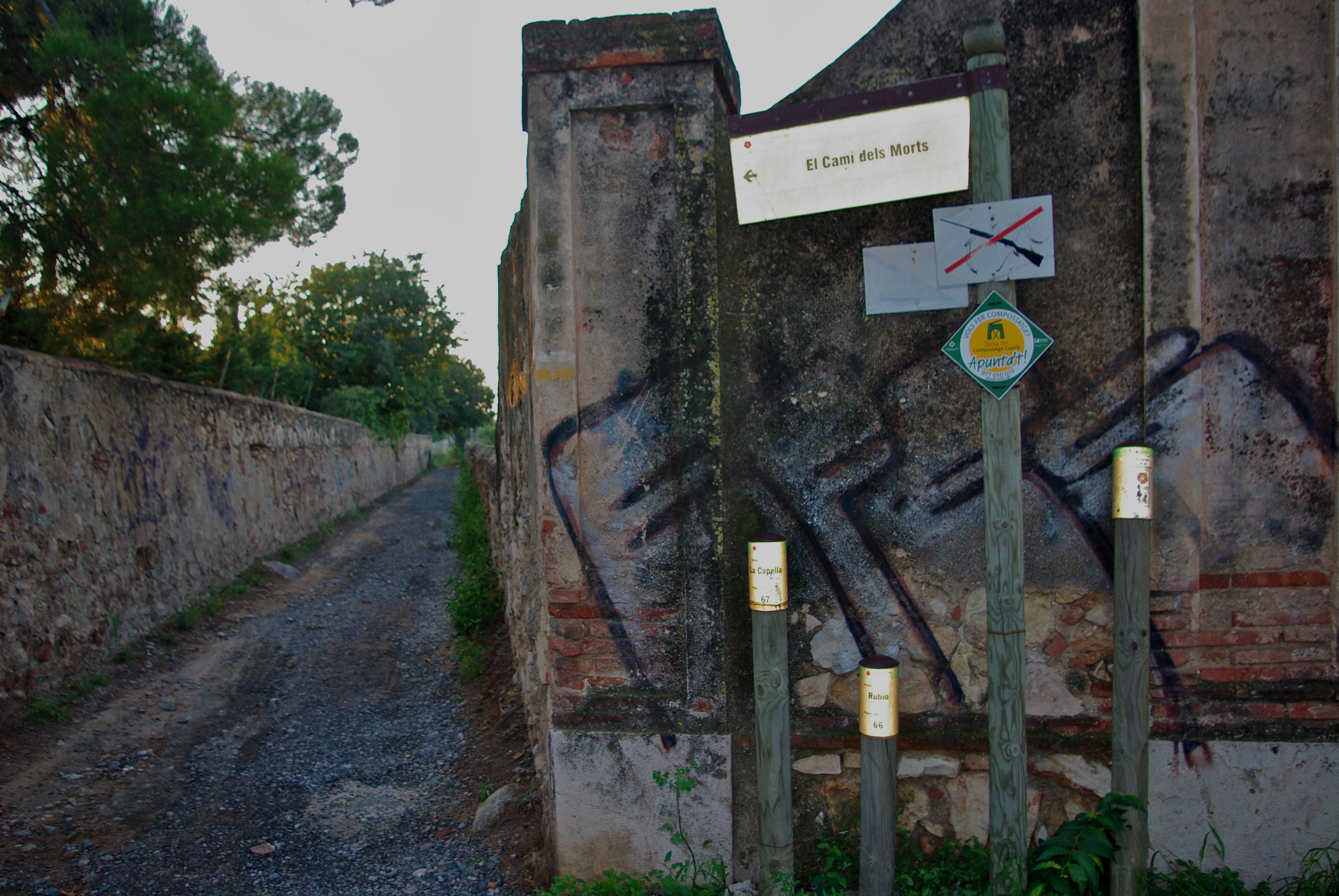 Inici de la partida de Rubió vora el camí dels morts i el Mas de Montagut